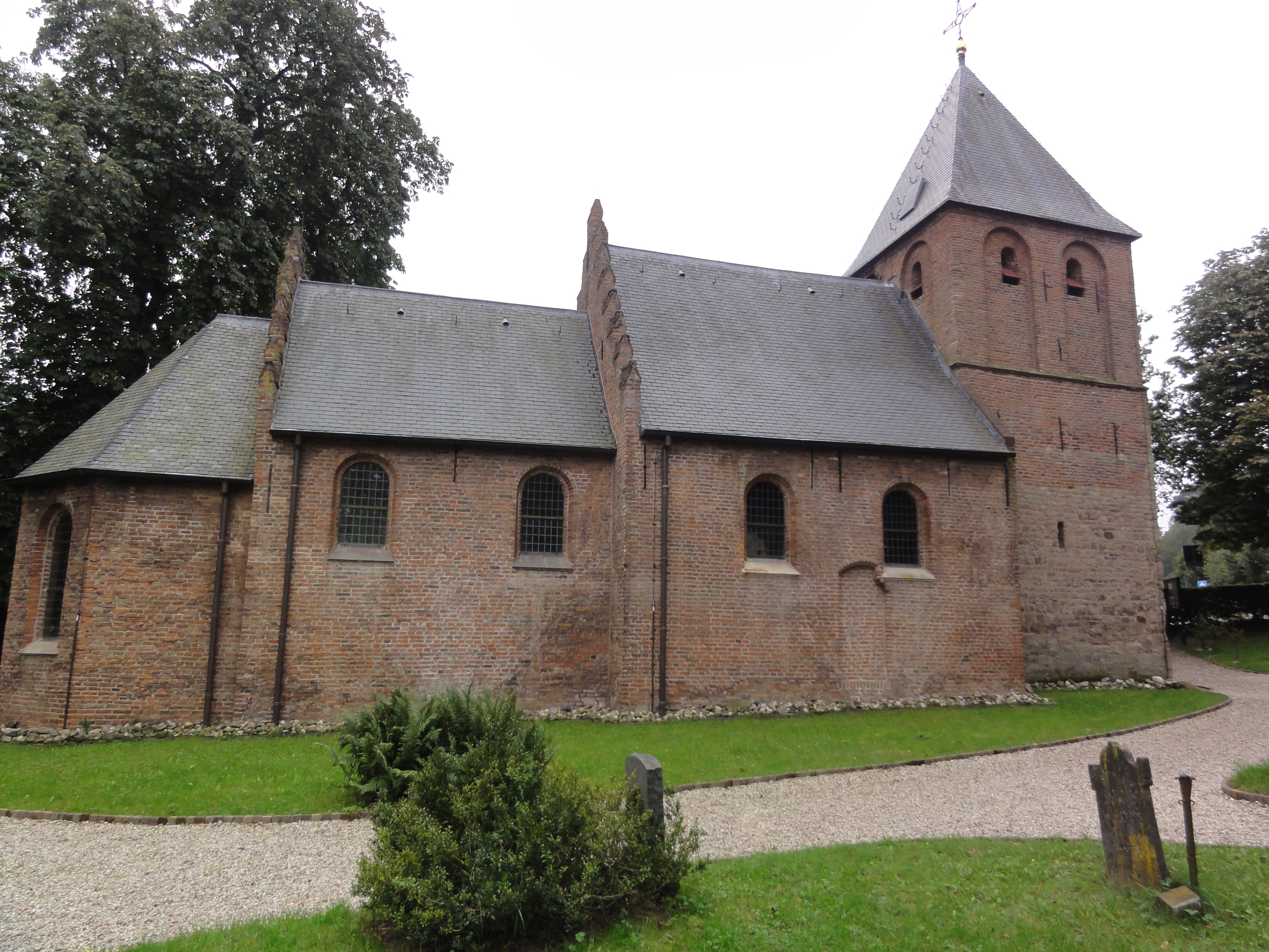 Beek (Ubbergen) Rijksmonument 35806 kleine Bartholomeuskerk Nieuwe holleweg 2. 54″ N, 5° 55′ 29.04″ E Object location51° 49′ 41.26″ N, 5° 55′ 30.27″ E